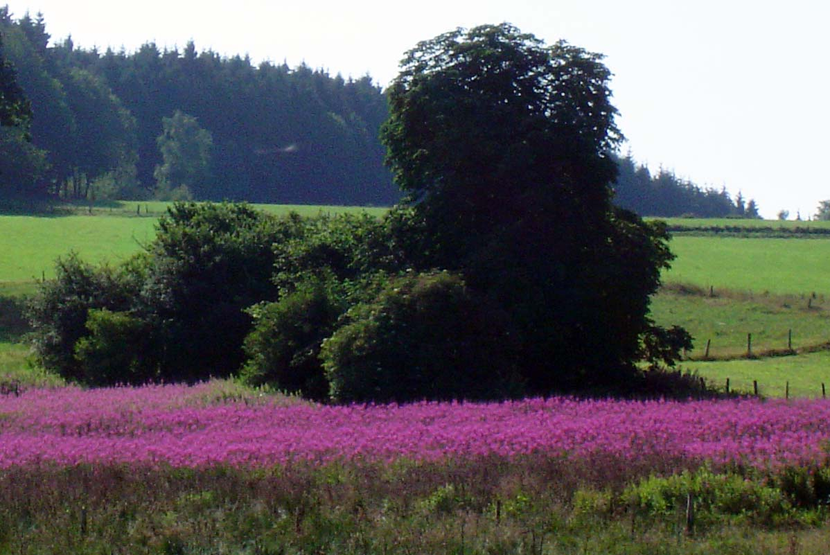 wilgenroosjes; eigen foto, juli 2004